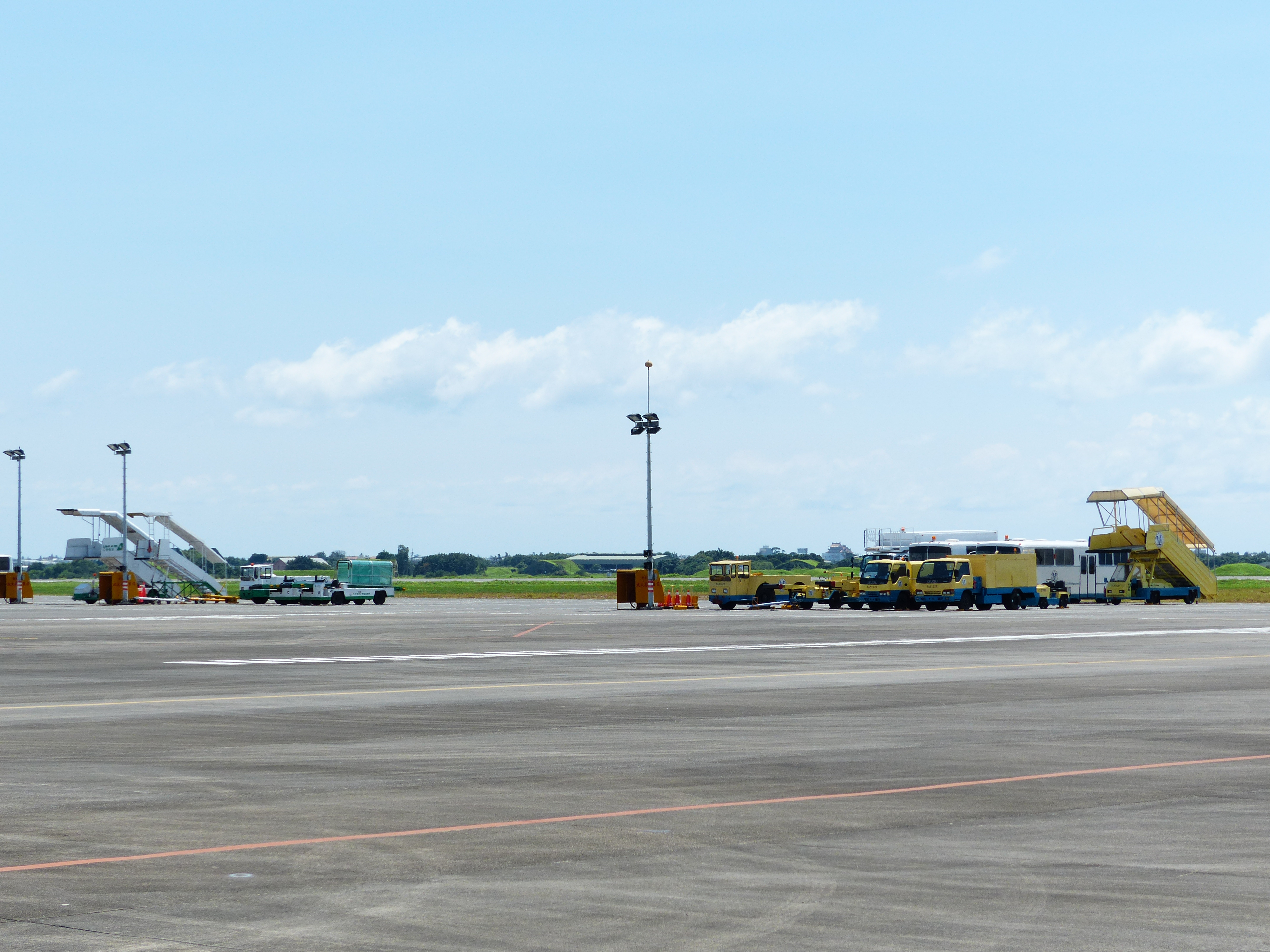 中文（台灣）: 臺南機場停機坪的加油車、行李車、接駁巴士等地勤車輛與登機梯。